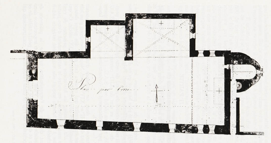 Saint-Clar, Gers, Occitanie, France : ancienne église Sainte-Catherine, plans relevés au milueu du XIXe siècle par l’entrepreneur Bourrousse : plan.